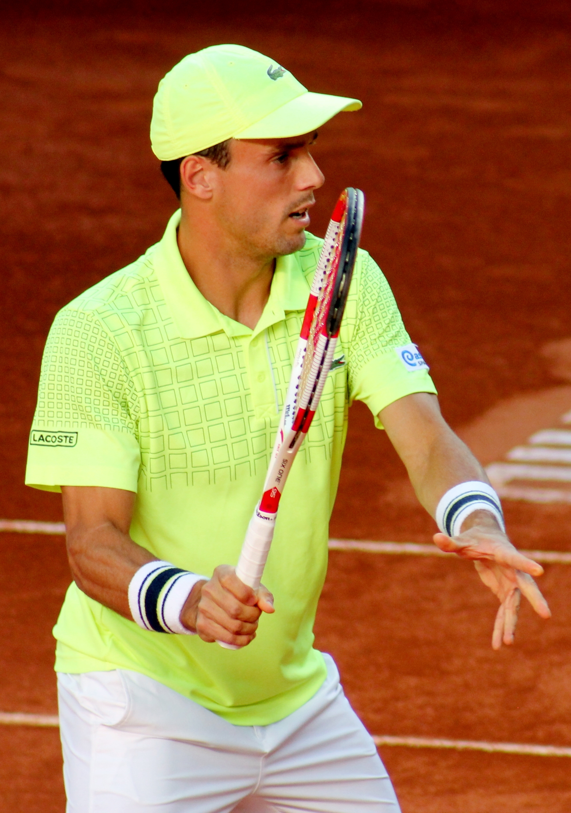 Bautista Agut MA14 (11)